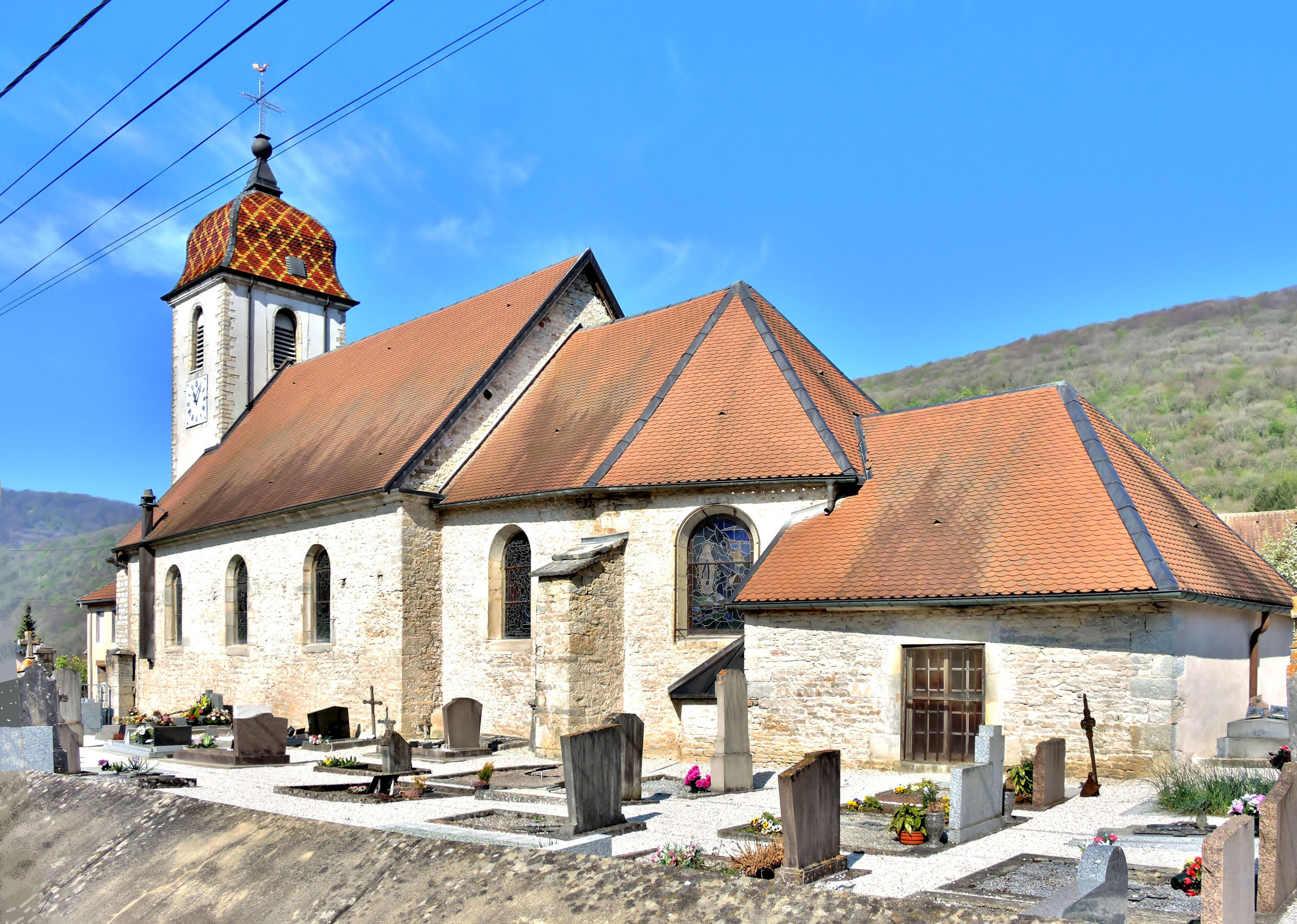 Eglise Saint Martin